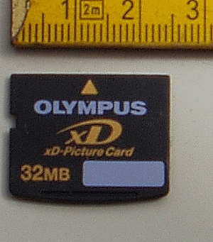 xD-Picture Card Fotografiert: selbst Lizenz: GNU Freie Dokumentationslizenz